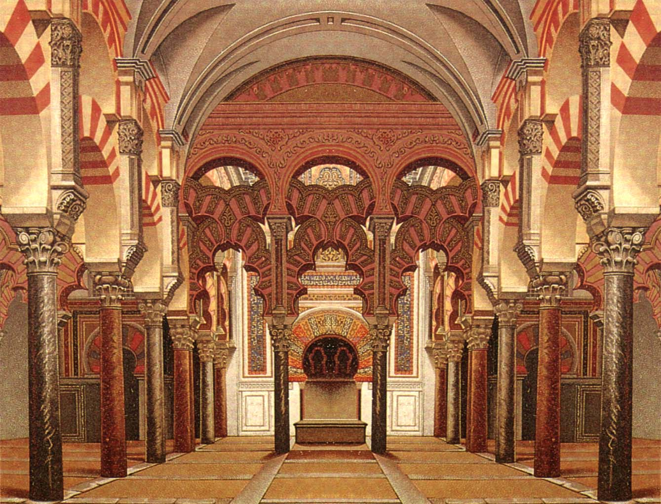 Mezquita de Córdoba. Interior. Cordoba. Art. Islam. Musulman. Spain. España.